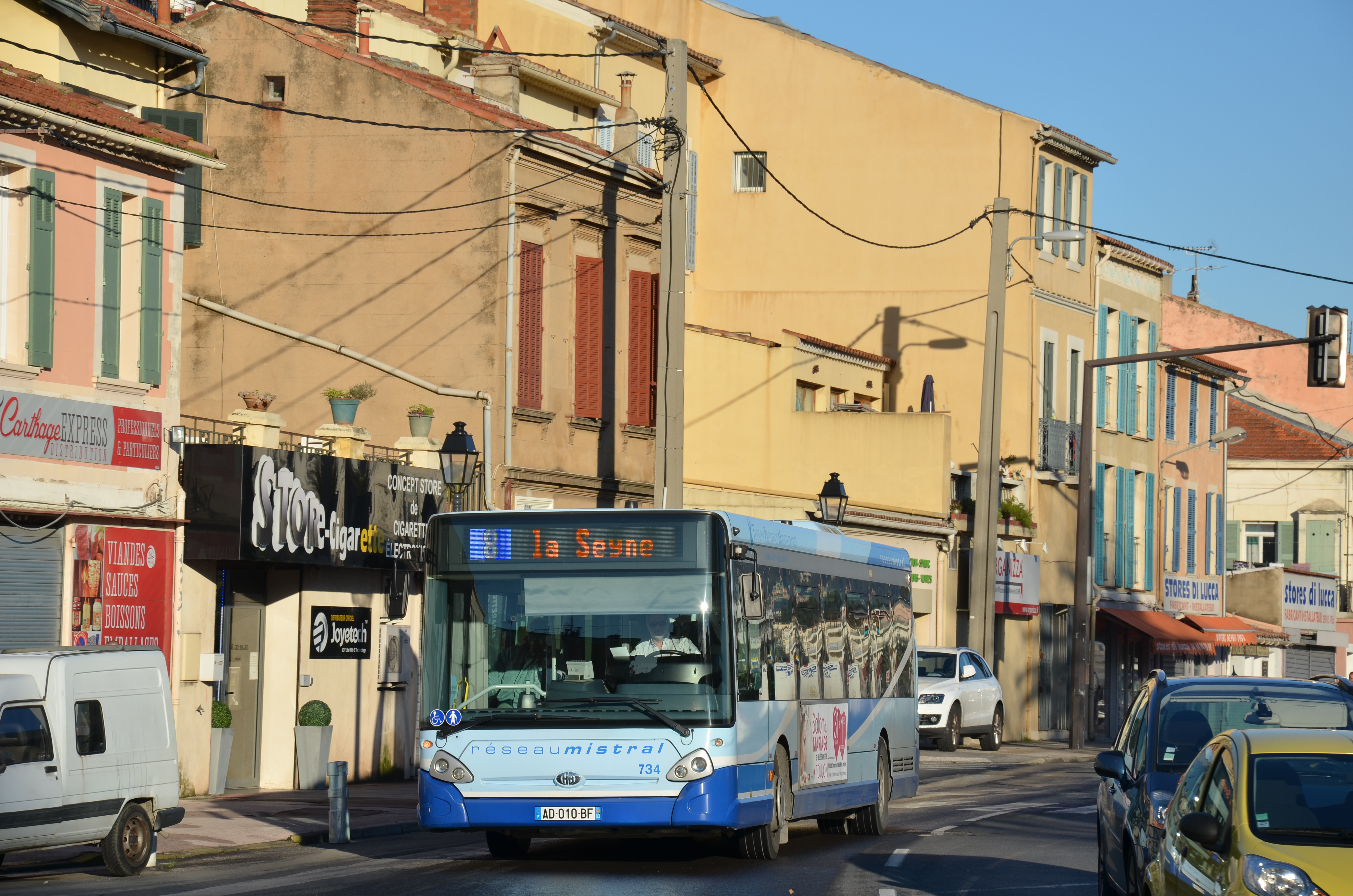 Heuliez GX 327 n°734 sur la ligne 8 du réseau Mistral de Toulon.